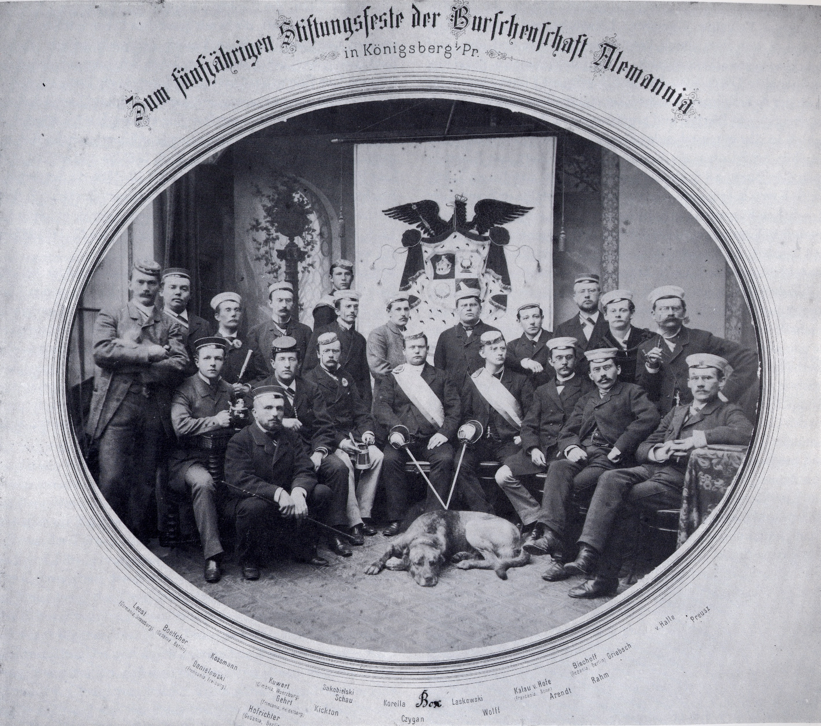 5. Stiftungsfest der Königsberger Burschenschaft Alemannia